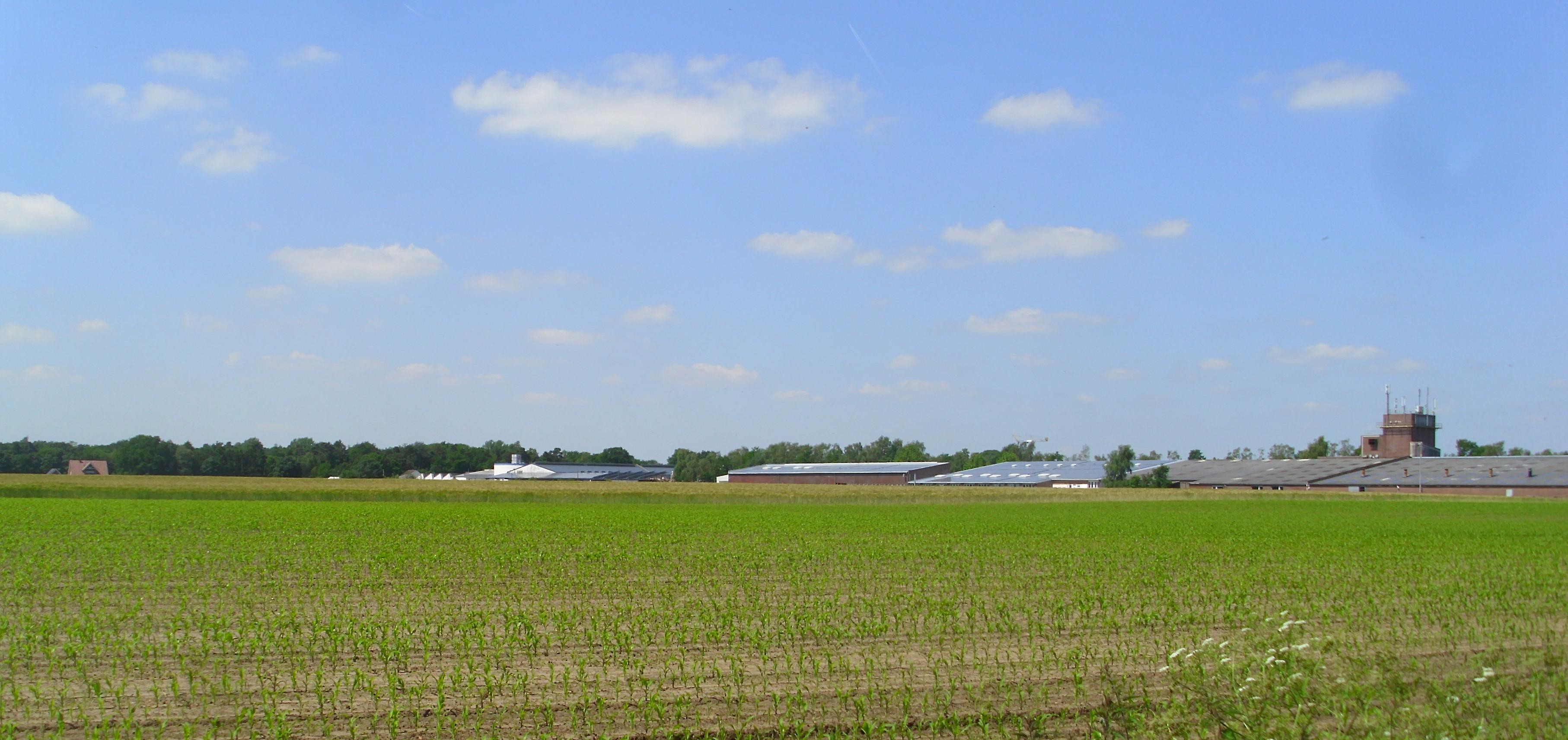 Blick von der Holtstiege auf das Gewerbegebiet St. Arnold. Auf den Flächen vor den bestehenden Hallen ist die südliche Erweiterung in Planung und Aufbau.